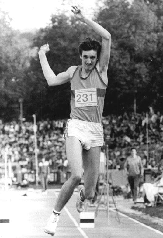 Volker Mai ADN-ZB Kluge 1.6.84 Erfurt: 35. Leichtathletik-Meisterschaften der DDR. Mit einem DDR-Juniorenrekord von 16,94 m im Dreisprung wurde Volker Mai DDR-Meister.